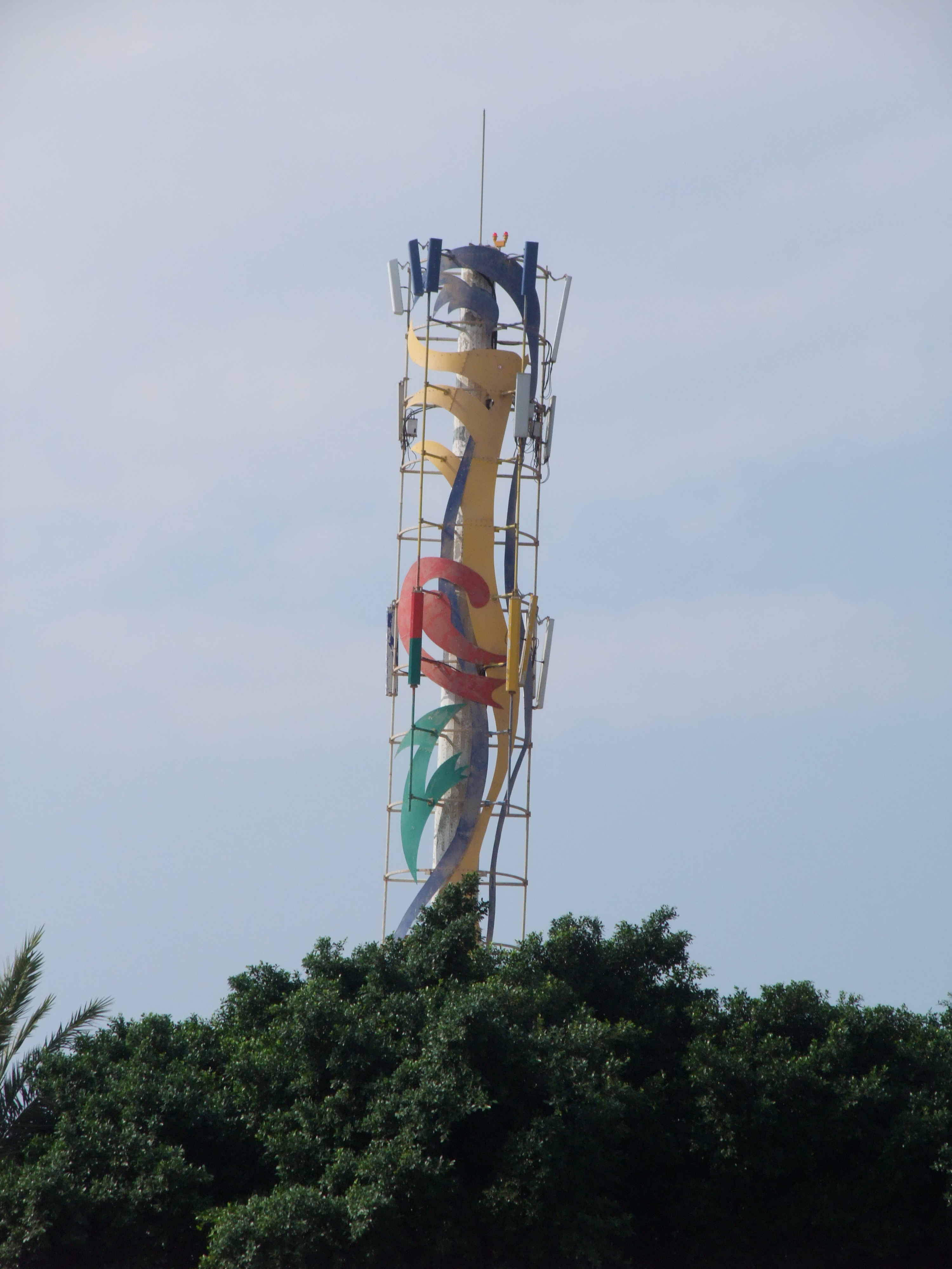 אנטנה סלולרית בנתניה